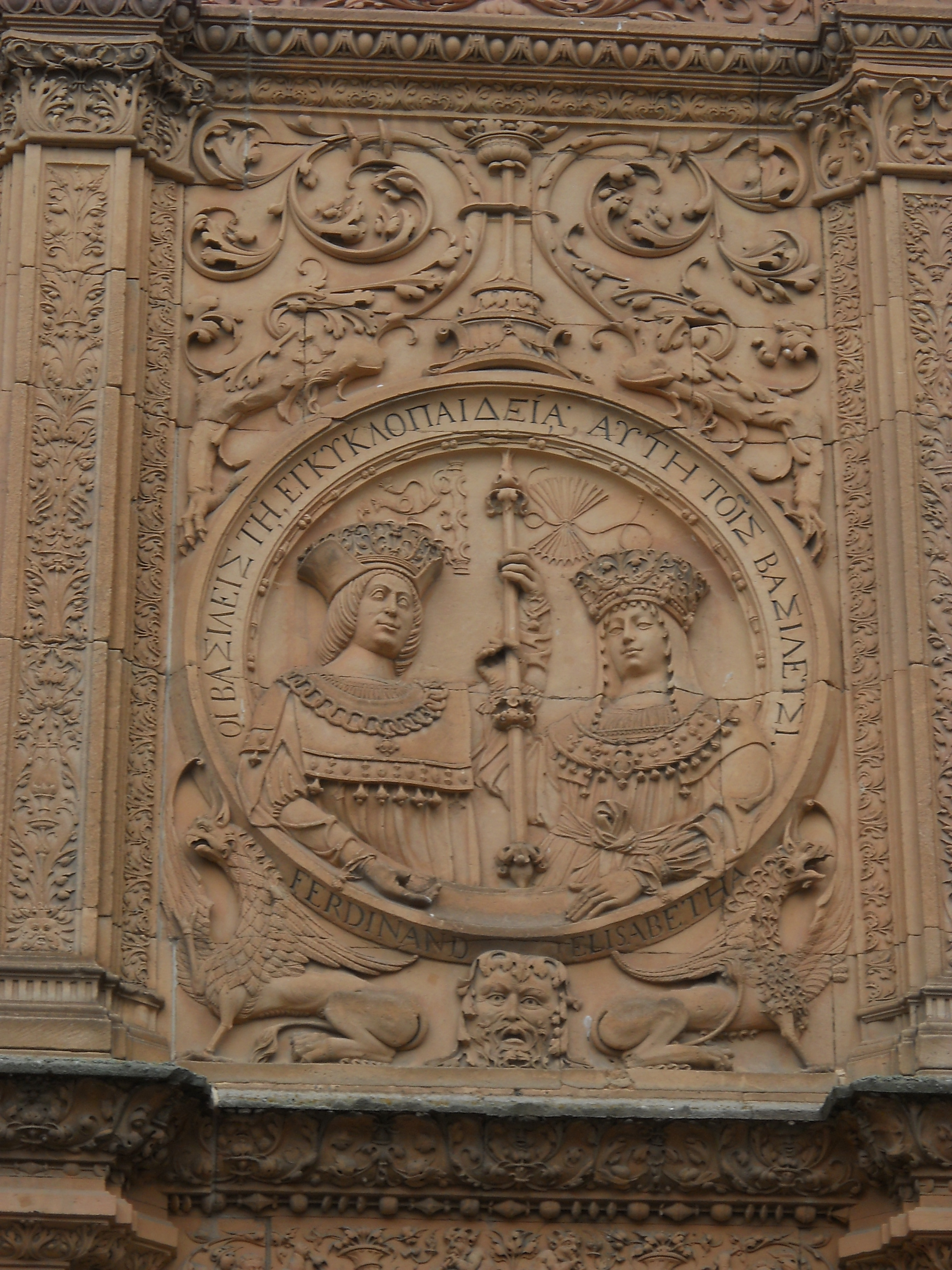 Detalle de la fachada de la Universidad de Salamanca, España